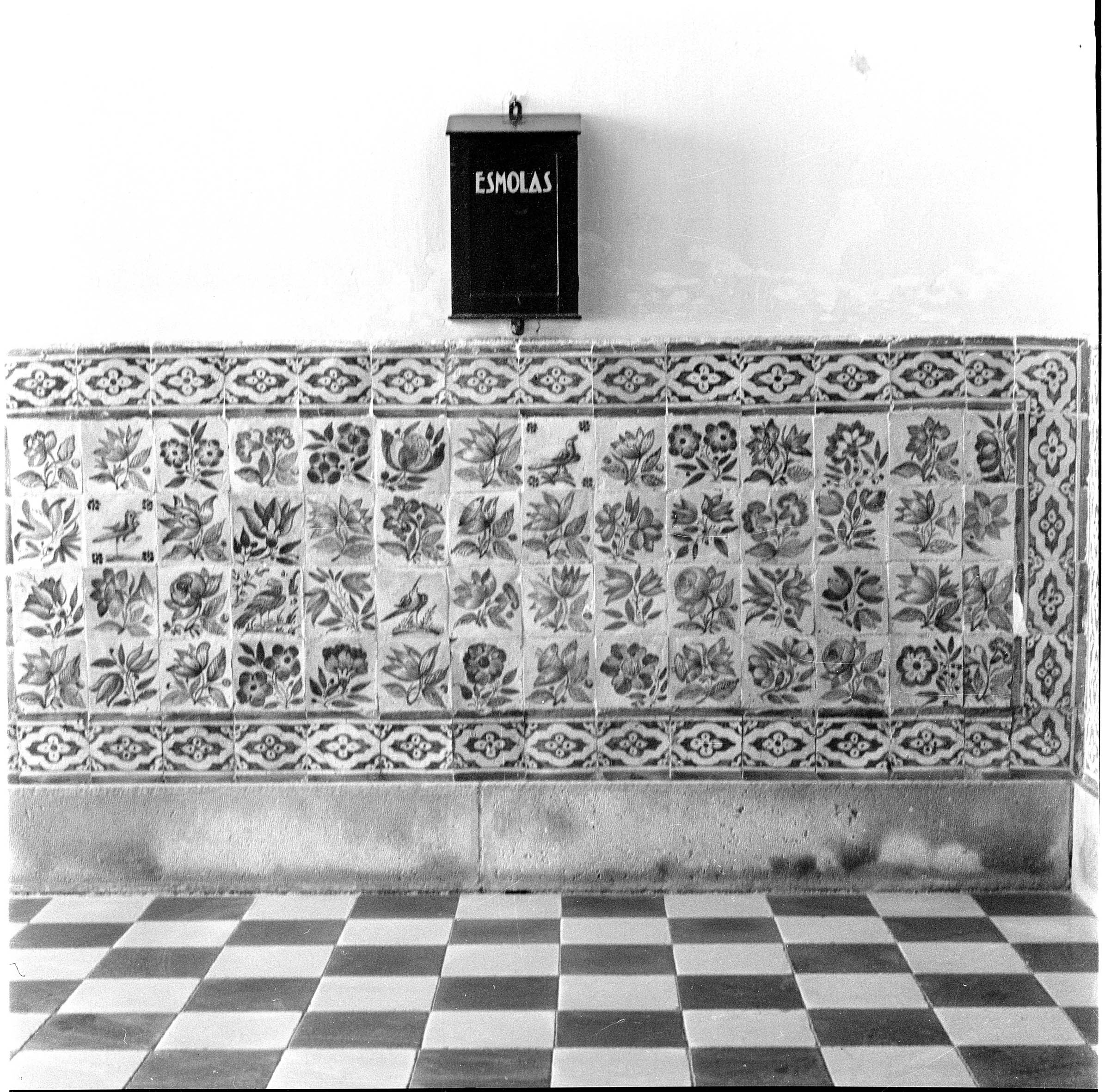 Painel de azulejos de figura avulsa. Azulejos do século18. Fotógrafo: João Miguel dos Santos Simões (1907-1972). Data de produção da fotografia original: 1960-1970. [CFT009.2317n.ic]